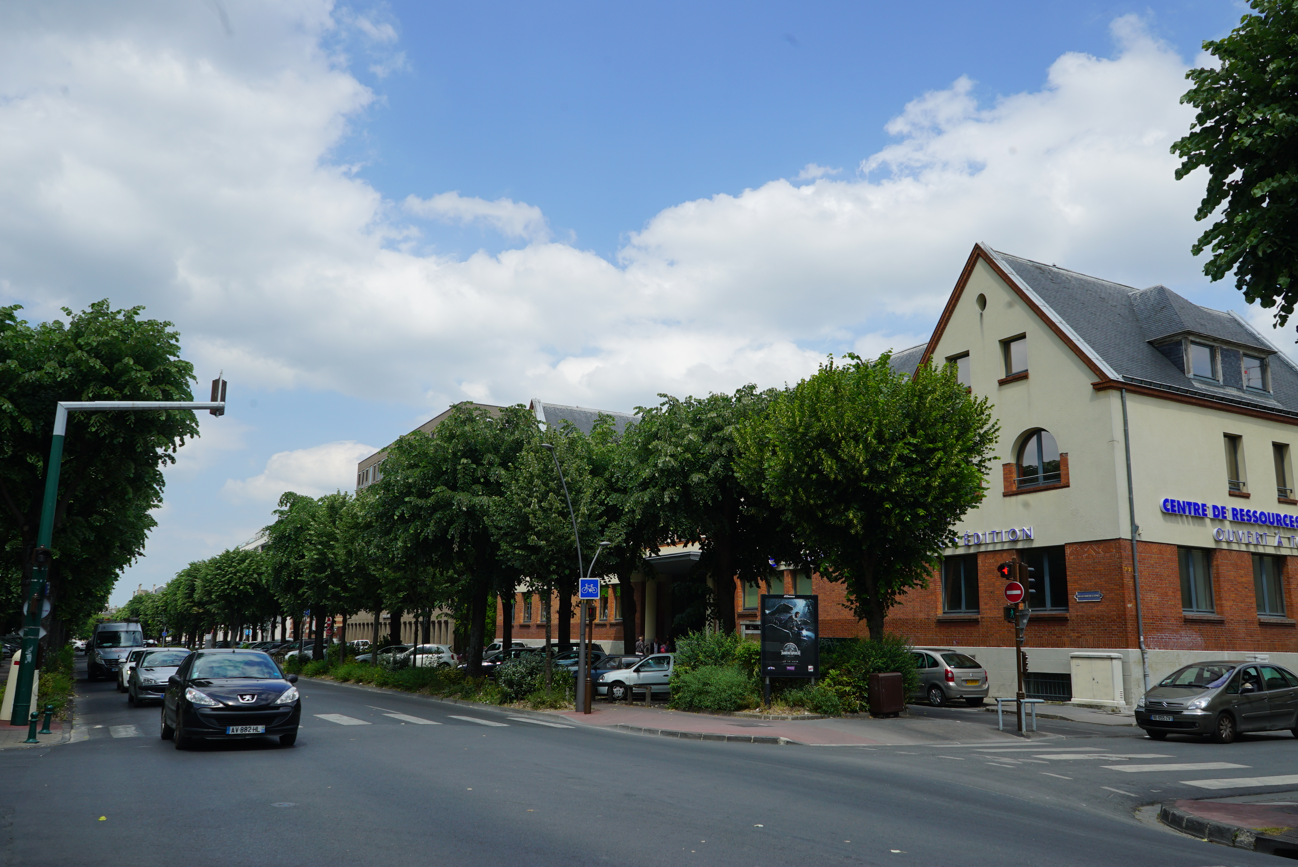 Rue de la Paix et CRDP Reims.